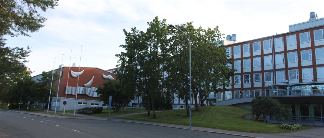 Savon ammatti- ja aikuisopiston päätoimipistettä Kuopion Haapaniemellä: Presidentinkatu 3:n rakennusta kadulta päin. Pääsisäänkäynnin viereisessä julkisivussa eroittuu kuvanveistäjä Väinö Lätin veistos Myötätuuli (1990).